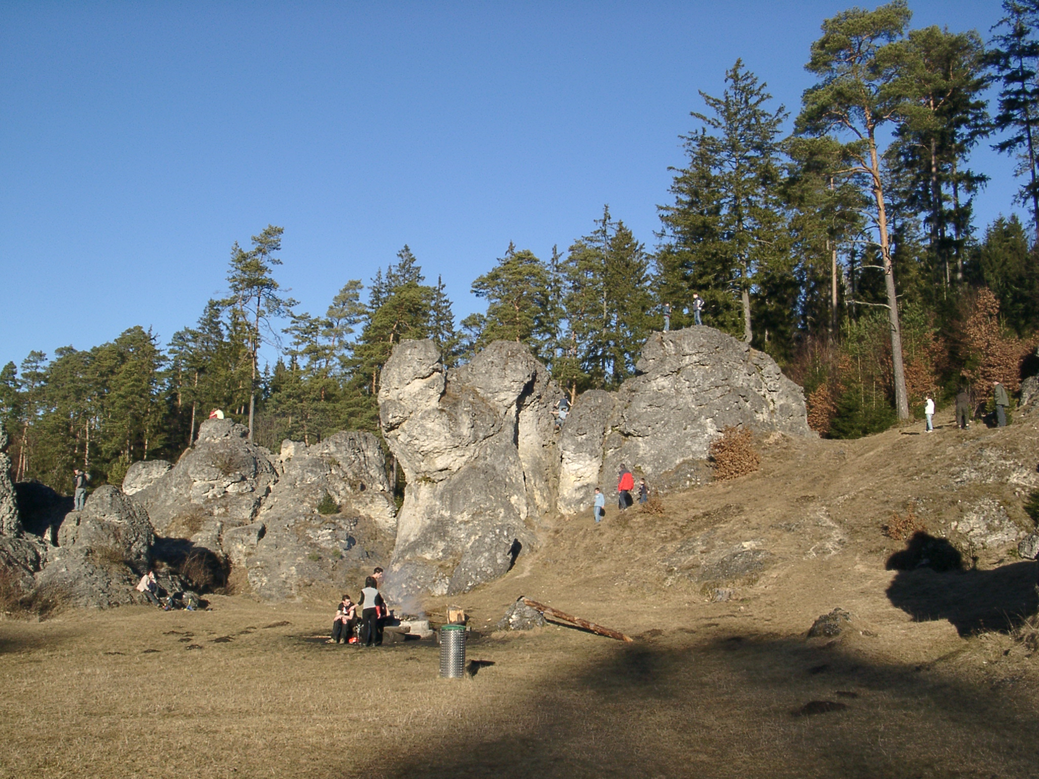 Wental, Schwäbische Alb: Felsenmeer Wental, ein Teilabschnitt des Naturschutzgebiets „Wental mit Seitentälern und Feldinsel Klösterle“